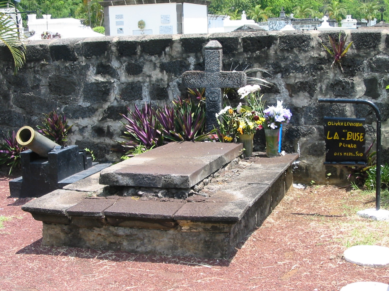 Das Grab des Piraten La Buse auf dem Friedhof von St. Paul, la Reunion